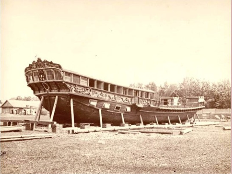 Галера «Тверь» на галерном дворе бывшего Казанского адмиралтейства. Казань. Фотография конца XIX века.